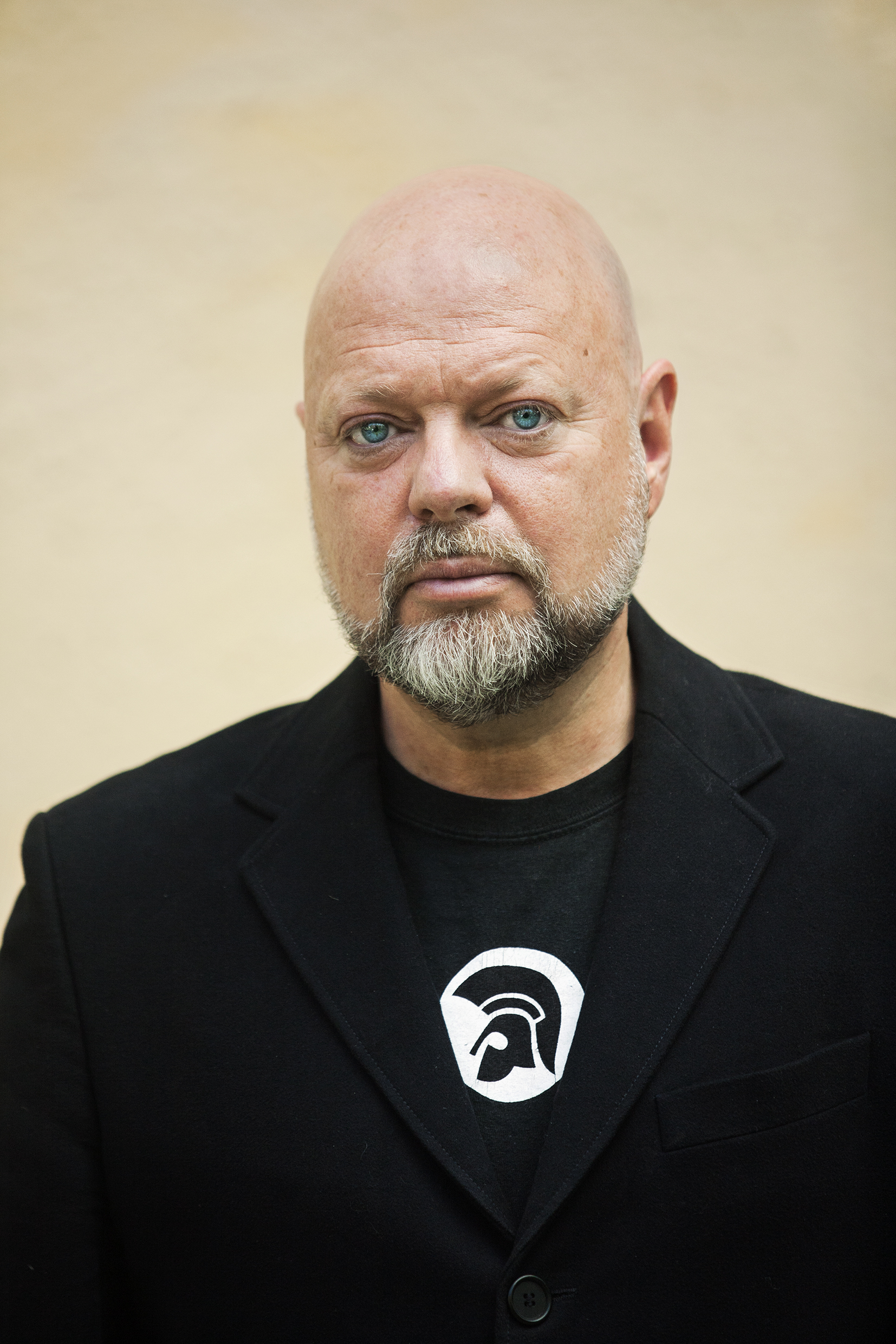 Artisten Peter LeMarc.